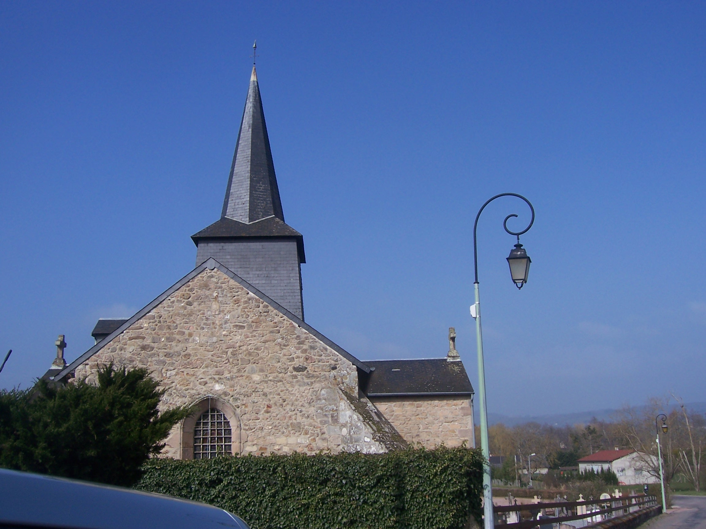 Eglise de Brion